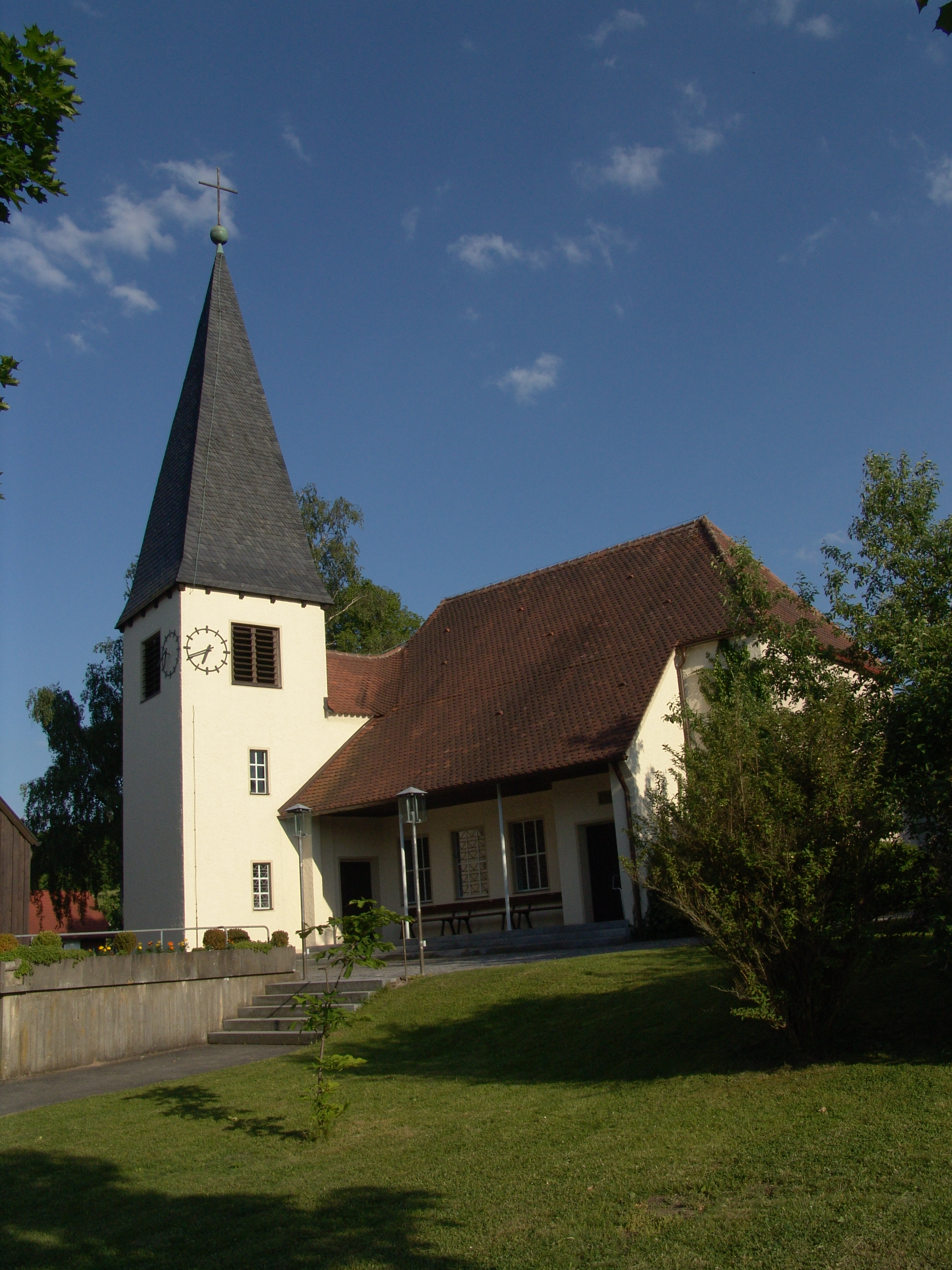 evang.-luth. Christuskirche in Vestenbergsgreuth